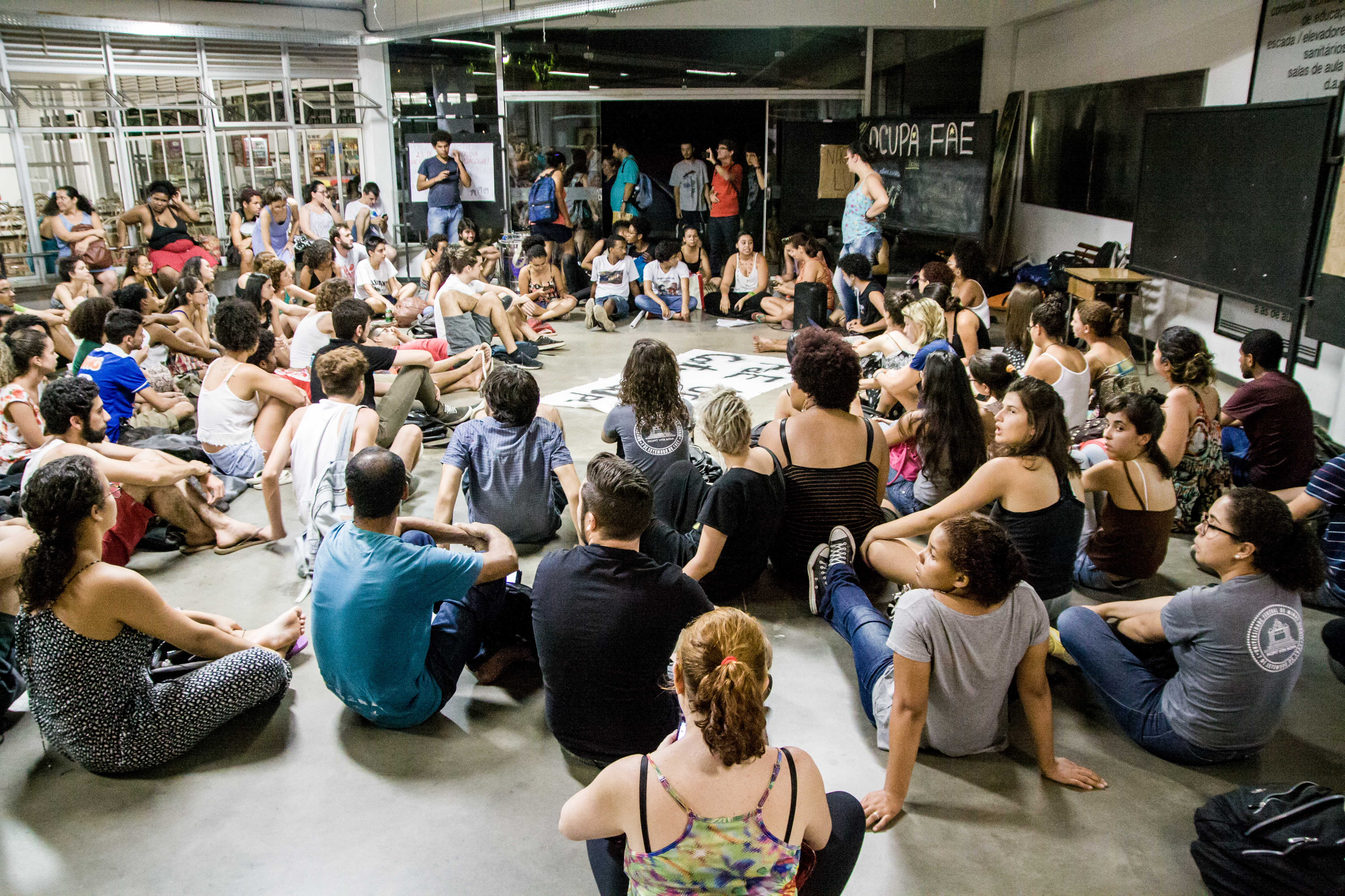 FAE na UFMG ocupada